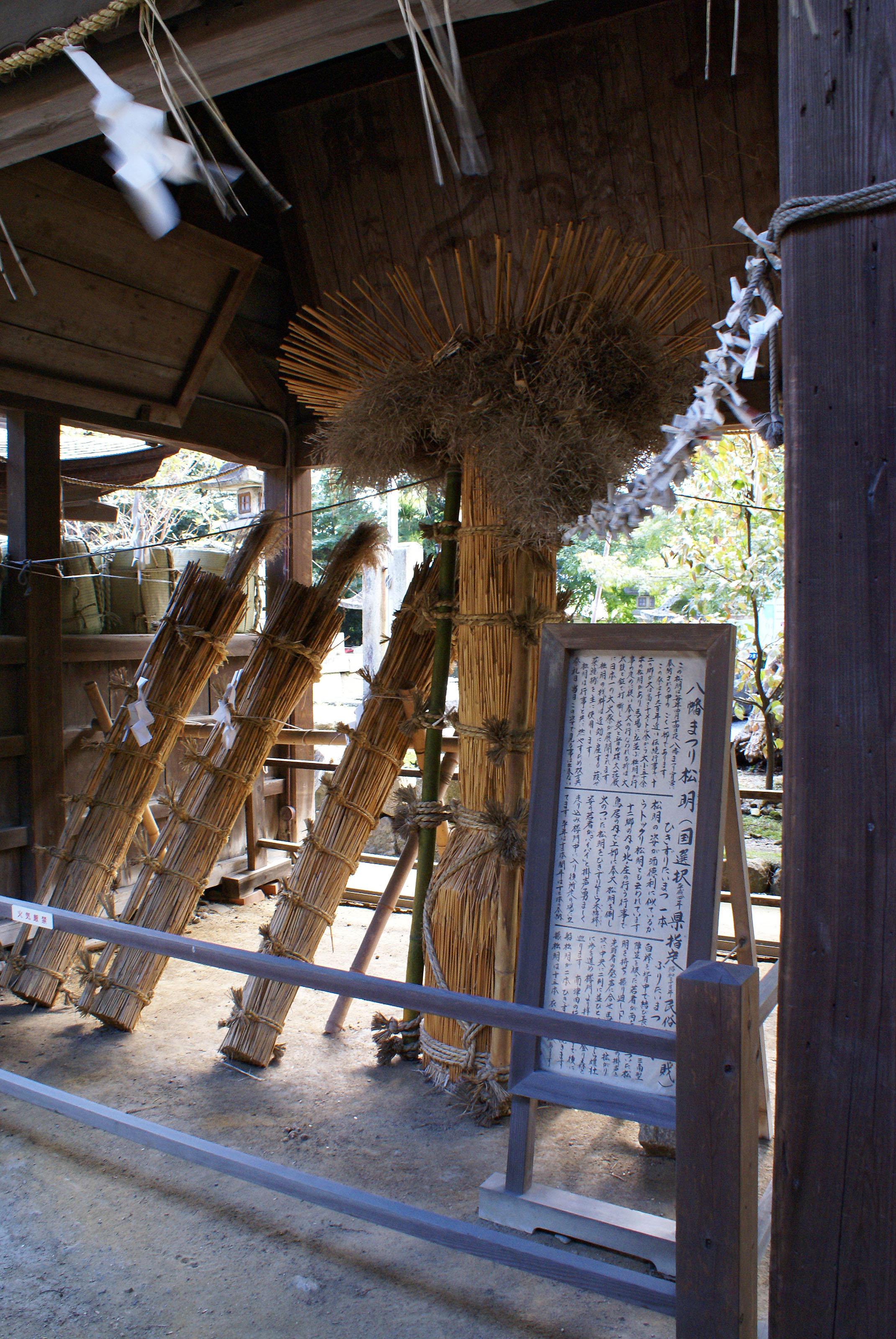 Himure-hachimangu in Omihachiman, Shiga, Japan